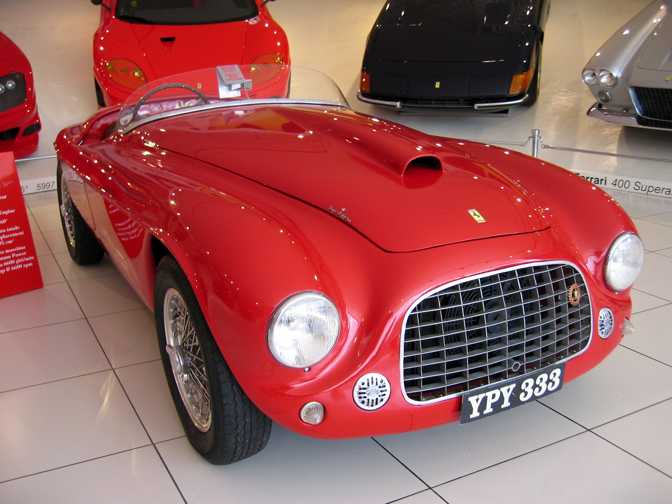 1948 Ferrari 166 MM at Galleria Ferrari in Maranello, Italy